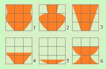 人類学者 長谷部言人（はせべことんど）による土器の器形による分類 1.甕 2.壺 3.深鉢 4.浅鉢 5.皿 6.高坏